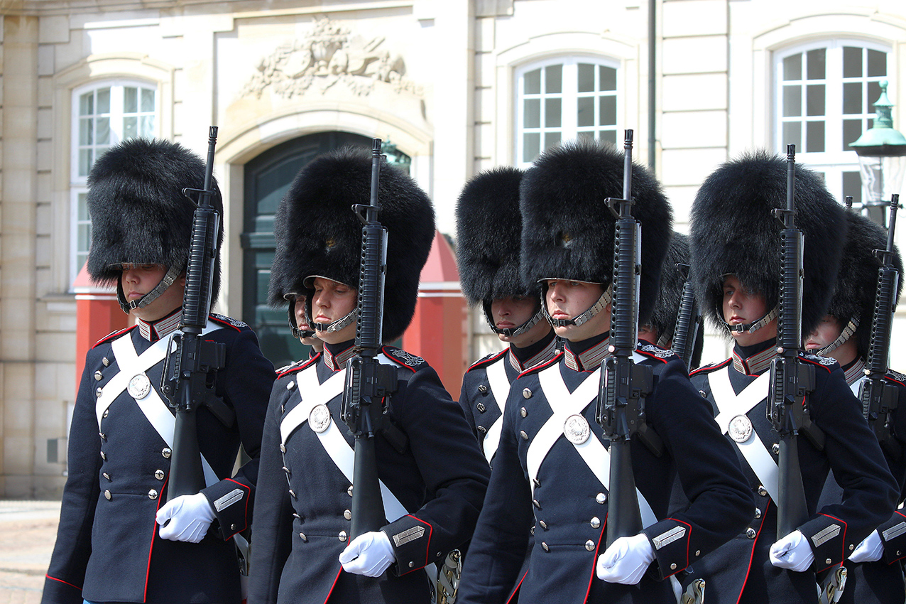 Dänische Leibgarde